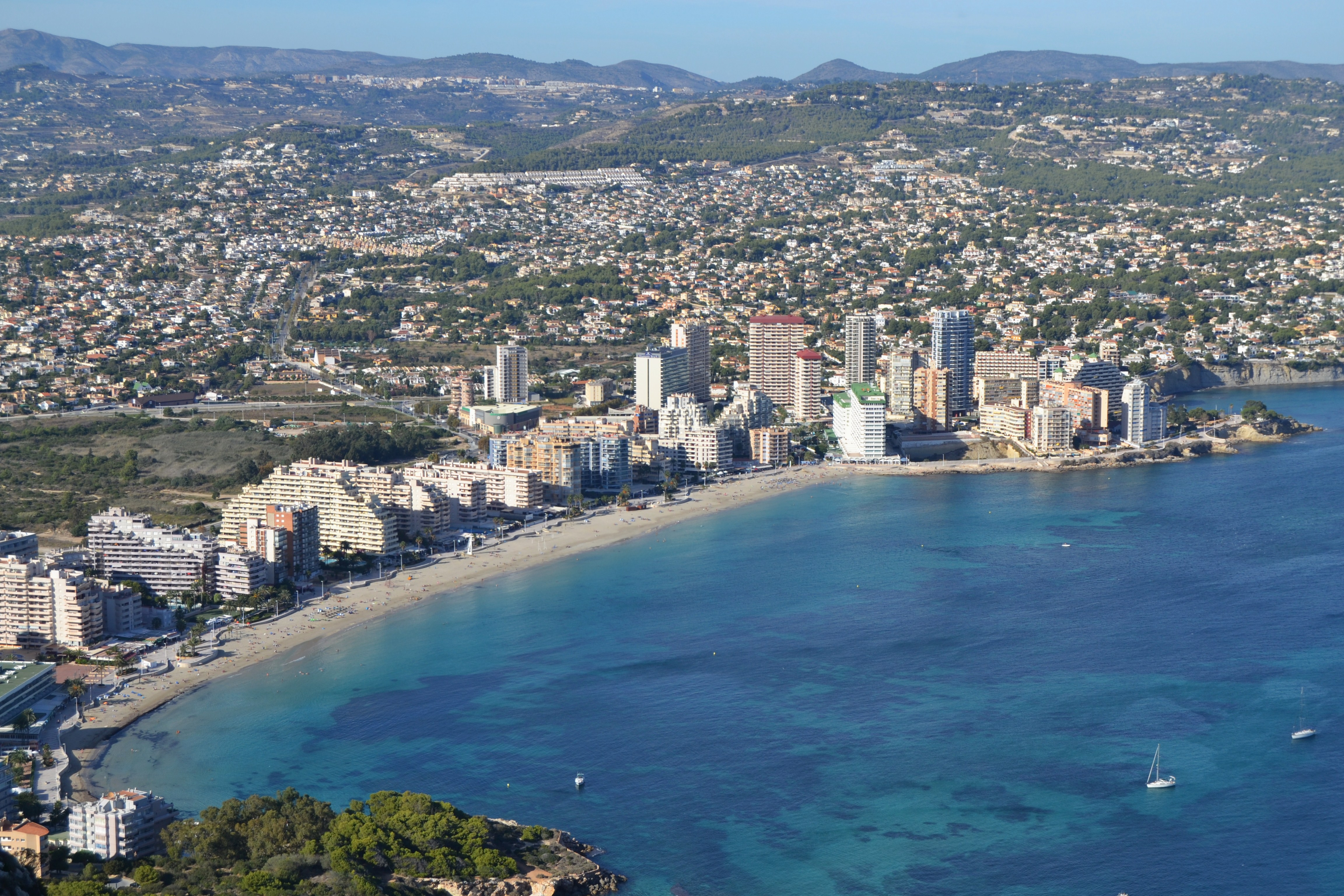 Platja de la Fossa des del penyal d'Ifac.